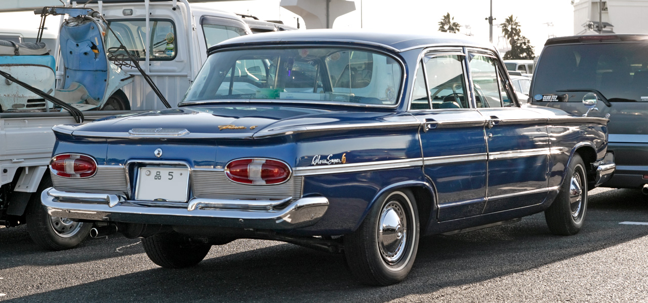 Prince GLoria 2000 Super 6 ( S41D )